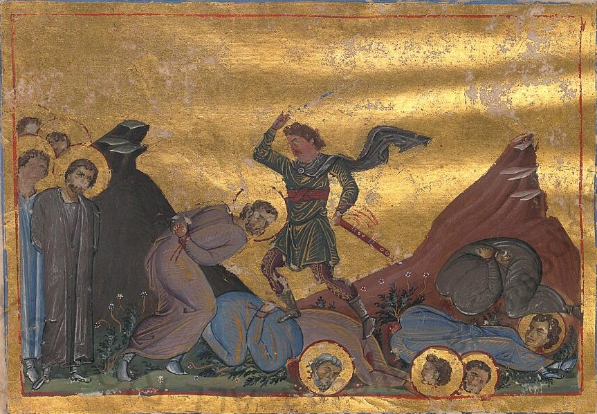 Памфил Кесарийский Константинополь. 985 г. Миниатюра Минология Василия II. Ватиканская библиотека. Рим.